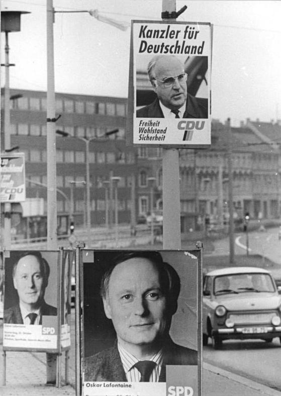 Potsdam, Bundestagswahl, Wahlwerbung ADN Karl-Heinz Schindler 15.11.90 Potsdam: Wahlkampf. Ein Kopf-an-Kopf-Rennen liefern sich - zumindest auf Wahlplakaten - die Spitzenkandidaten von SPD und CDU in der Hauptstadt des Landes Brandenburg.